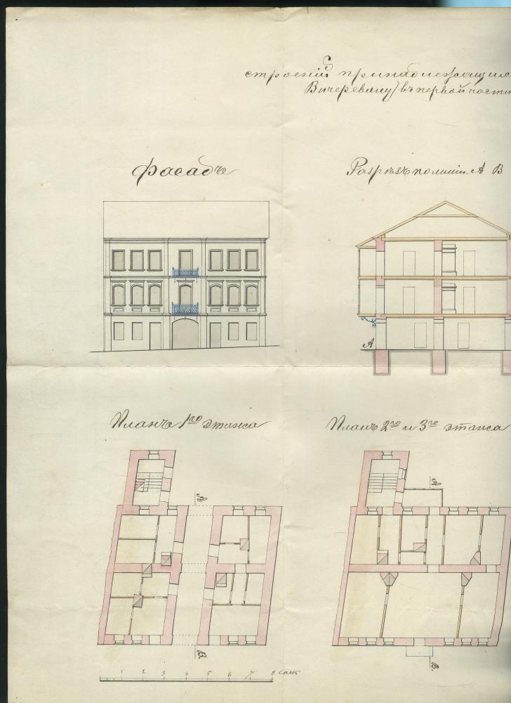 Беларуская (тарашкевіца): Менск (Miensk), вуліца Койданаўская (vulica Kojdanaŭskaja). Пляны і рысункі мураванага трохпвярховага жылога дома і гаспадарчых пабудоваў купца Г. Вечарэвіна (Viečarevin)